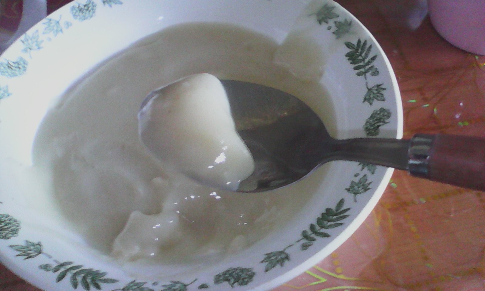 Слово "кисель" произошло от старославянского "кысль", "кысель", что означает кислый, квашеный - овсяного киселя (несладкое, кисловатое студенистое блюдо). Современные сладкие фруктово-ягодные кисели на крахмале имеют только общее название с ним и являются десертом. Едят кисель следующим образом (1): Зачерпывают 1/3-1/2 ложки киселя.